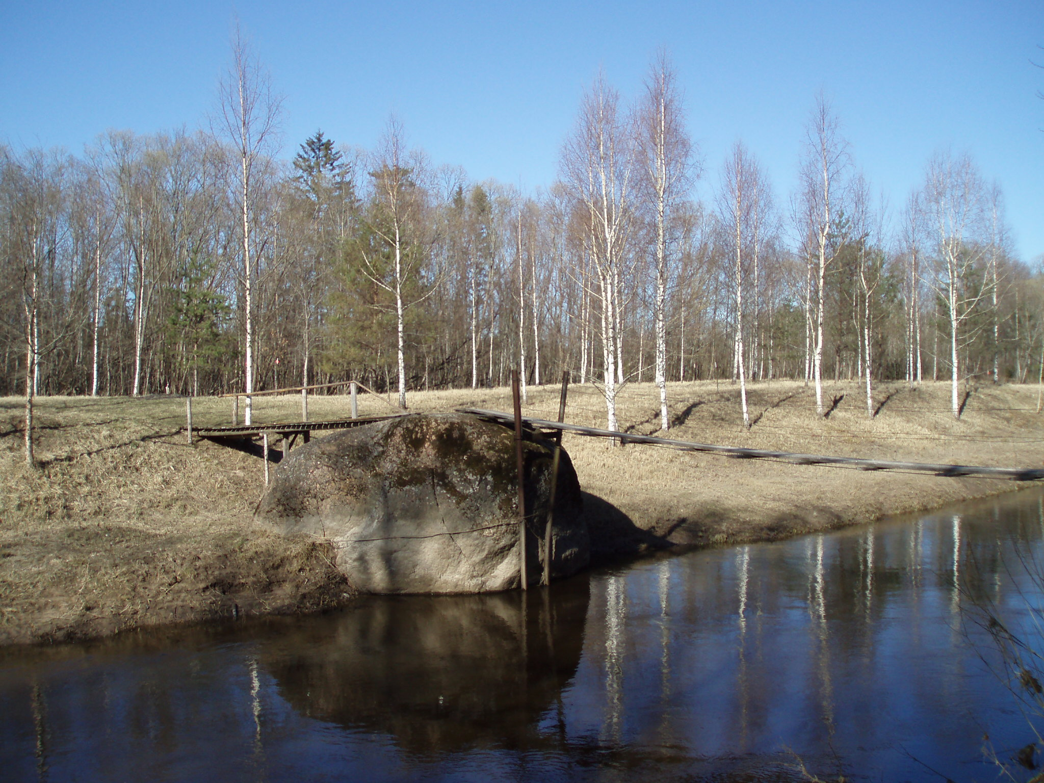 Velna Skroderis Kujas upes krastā. 2007. gada aprīlī.